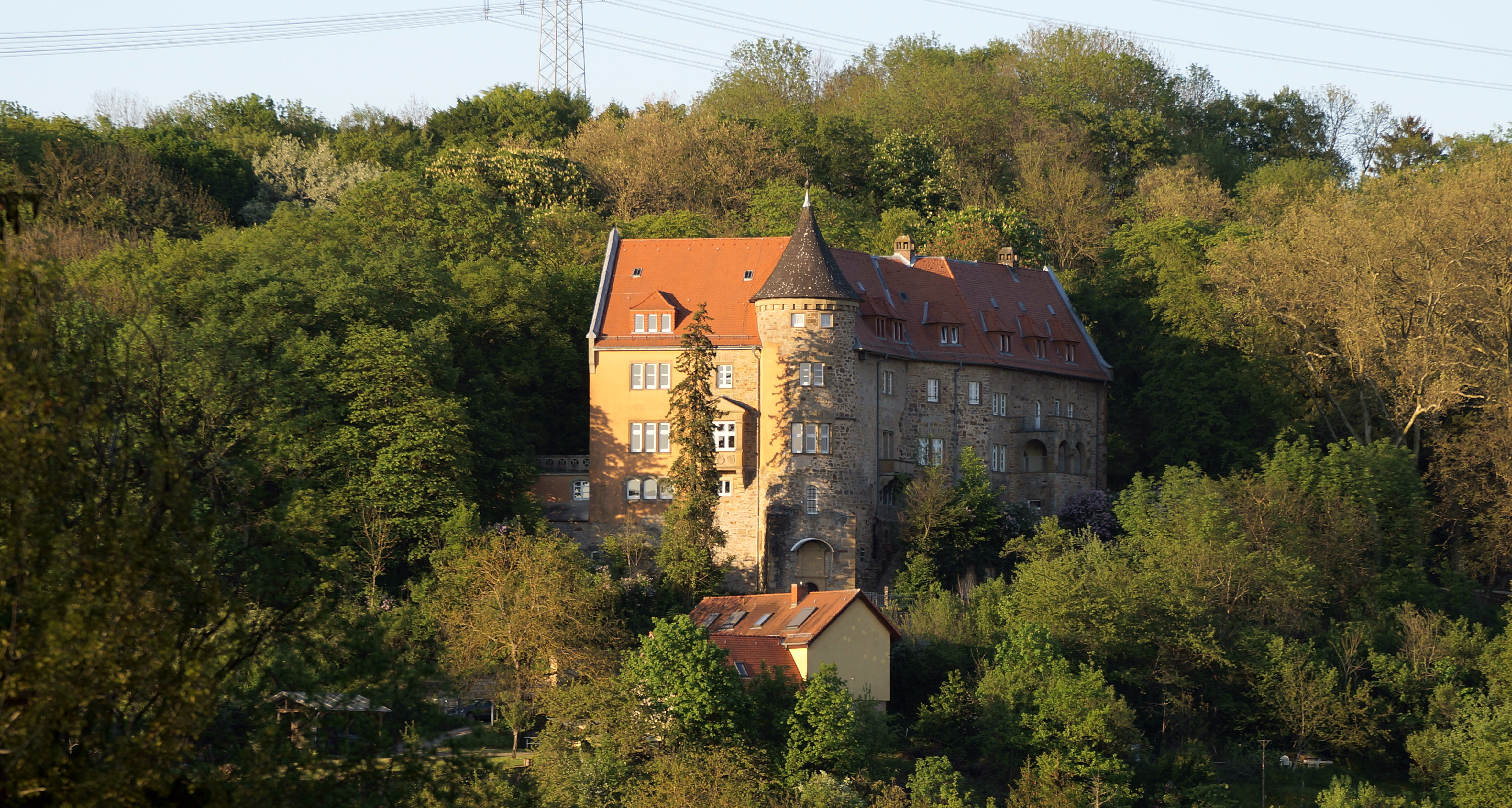 "Jugendburg Rotenberg" Jugendbildungsakademie und Jugendherberge.